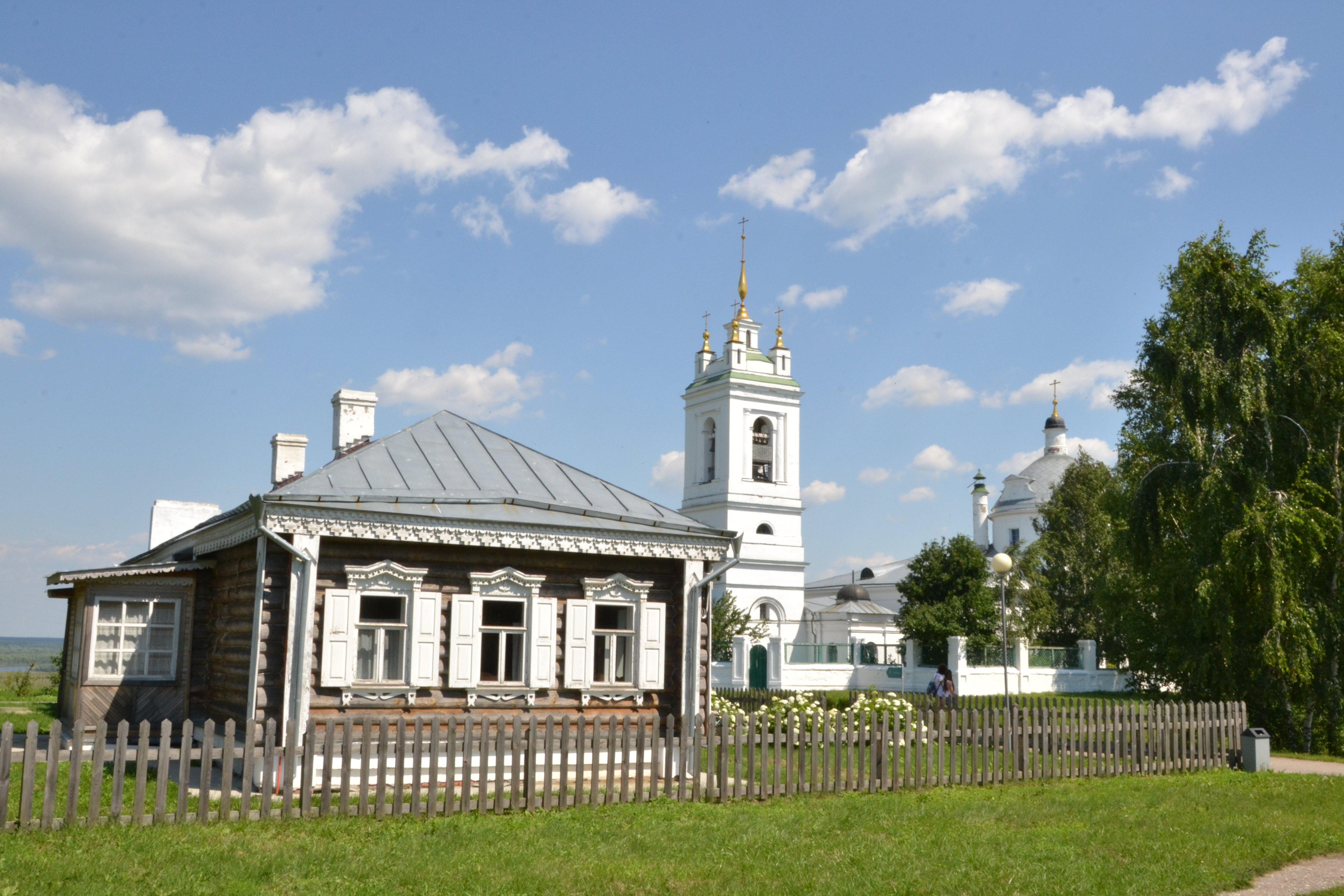 Дом священника И.Я. Смирнова и храм с. Константинова